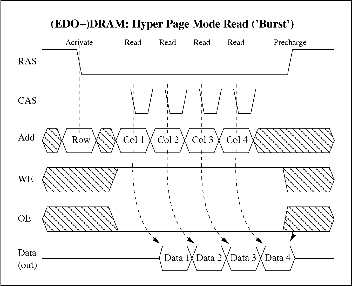 vereinfachte Darstellung eines 'Burst-Read'-Zugriffes eines EDO-DRAMs